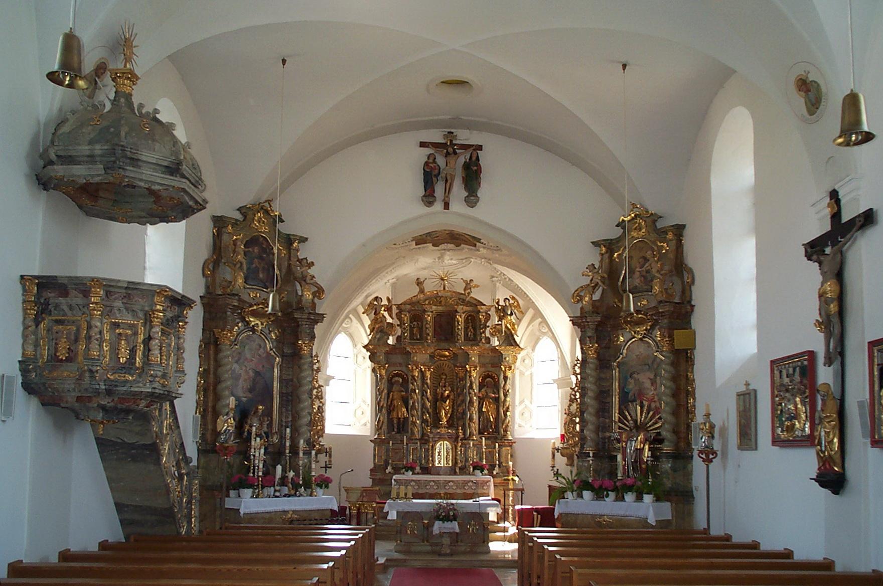 Rottenburg an der Laaber. Inkofen, Haus Nr. 117. Katholische Pfarrkirche Mariä Reinigung mit Kapelle. Saalkirche aus der zweiten Hälfte 15. Jahrhunderts. Barocker Ausbau in der Mitte des 17. Jahrhunderts. Im Langhaus und Chor Kreuzgewölbe. Der Chorbogen ist spitzbogig, im Profil einmal gestuft. Am Chorgewölbe Barockstuckaturen um 1680 mit schönem Rahmenwerk, Laubgewinde und Fruchtgehängen. Das Deckengemälde aus dem 18. Jahrhundert stellt Simon Stock dar. Die Seitenaltäre sind schräg gestellt. Die achteckige Kanzel wurde 1688 errichtet.